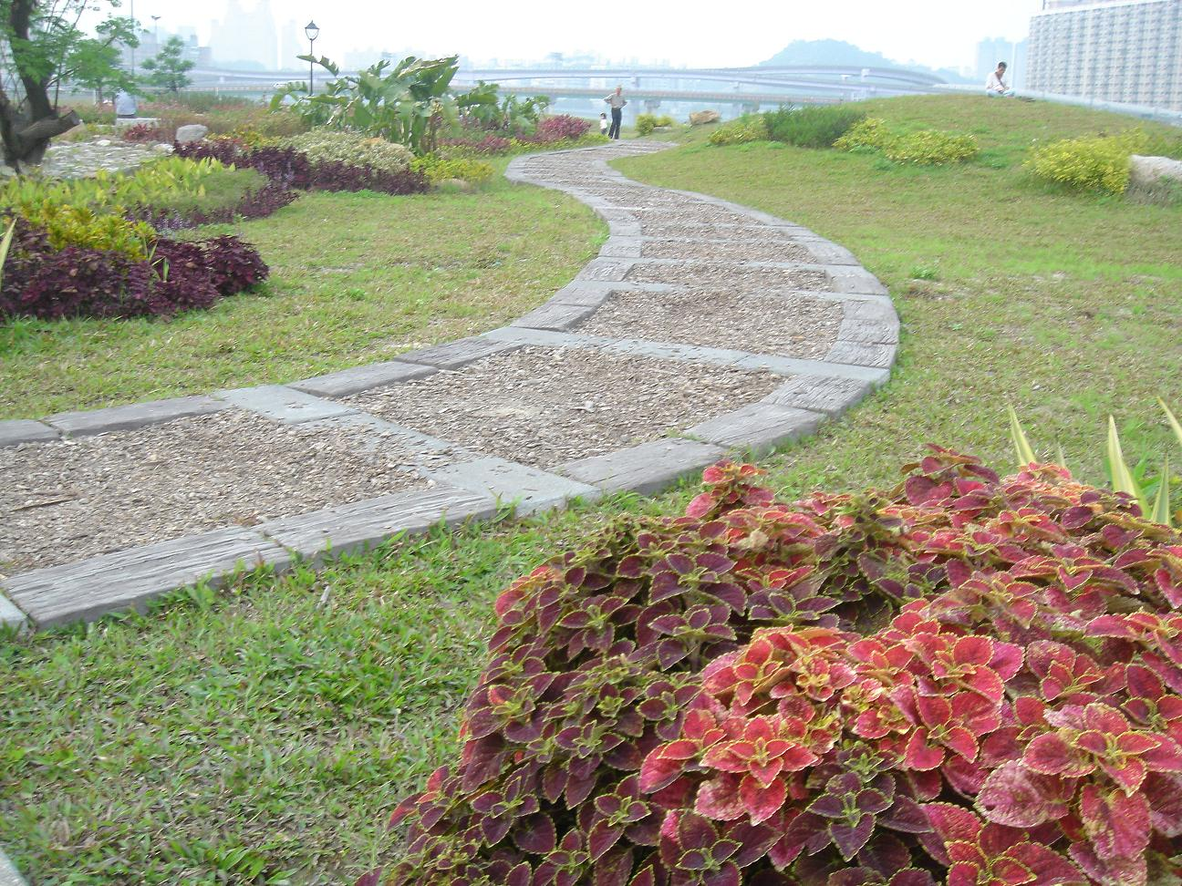 台北縣新店市陽光運動公園枕木步道。